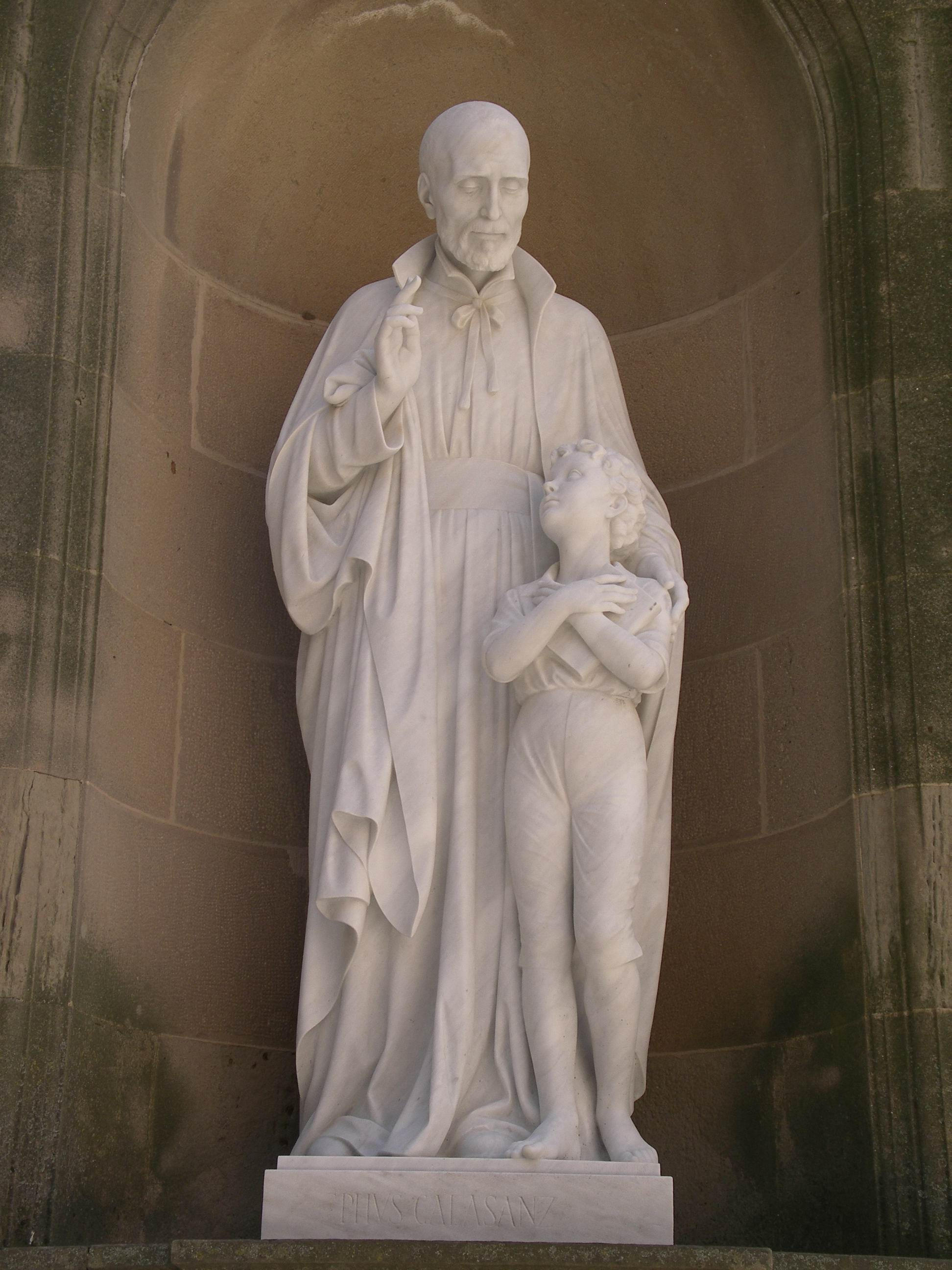 Sant Josep de Calassanç, a les places del monestir, Abadia de Montserrat